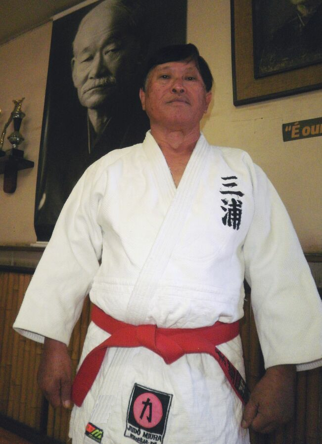 sensei T. Miura em sua academia